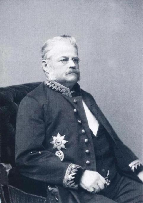 Senaattori ja kuvernööri Carl Gustaf von Kraemer (1817–1898).